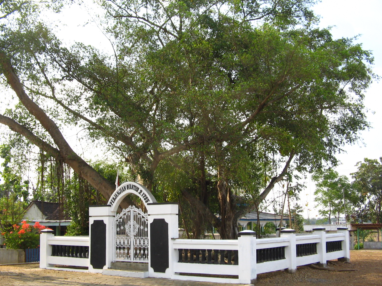 Lokasi penandatanganan Perjanjian Giyanti 13 Februari 1755. Di dalamnya terdapat batu datar kecil sebagai alas untuk penandatanganan lembar perjanjian. Tempat ini sekarang dipagari dan dirawat oleh kerabat Keraton Kasunanan Surakarta dan Kesultanan Yogyakarta.